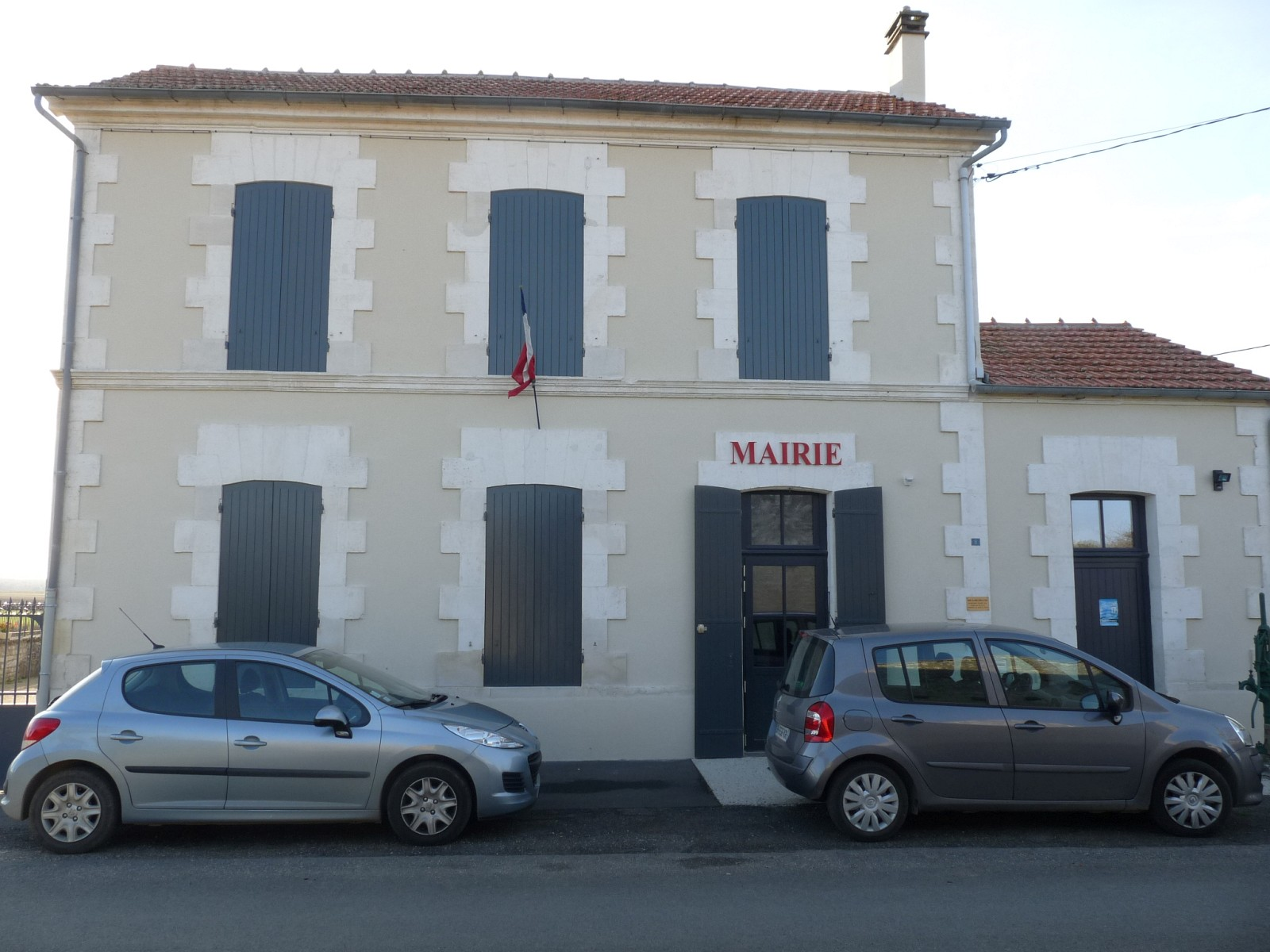 Mairie de St-Ouen-la-Thène, Charente-Maritime, France